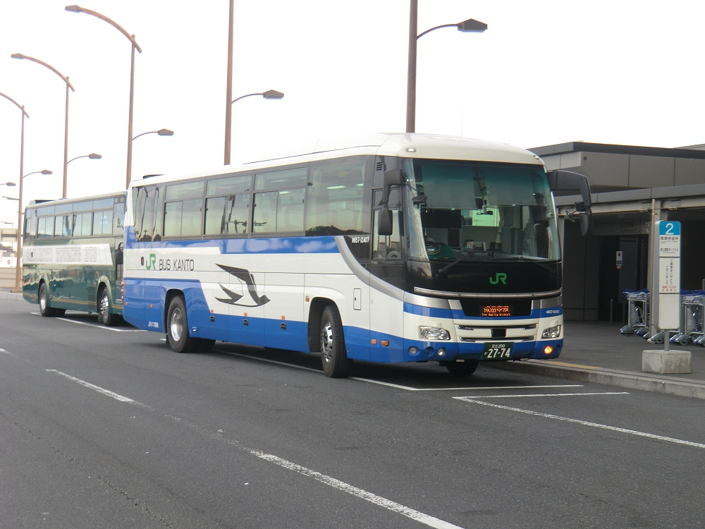 THEアクセス成田で運用されるJR bus Kanto H657-12407